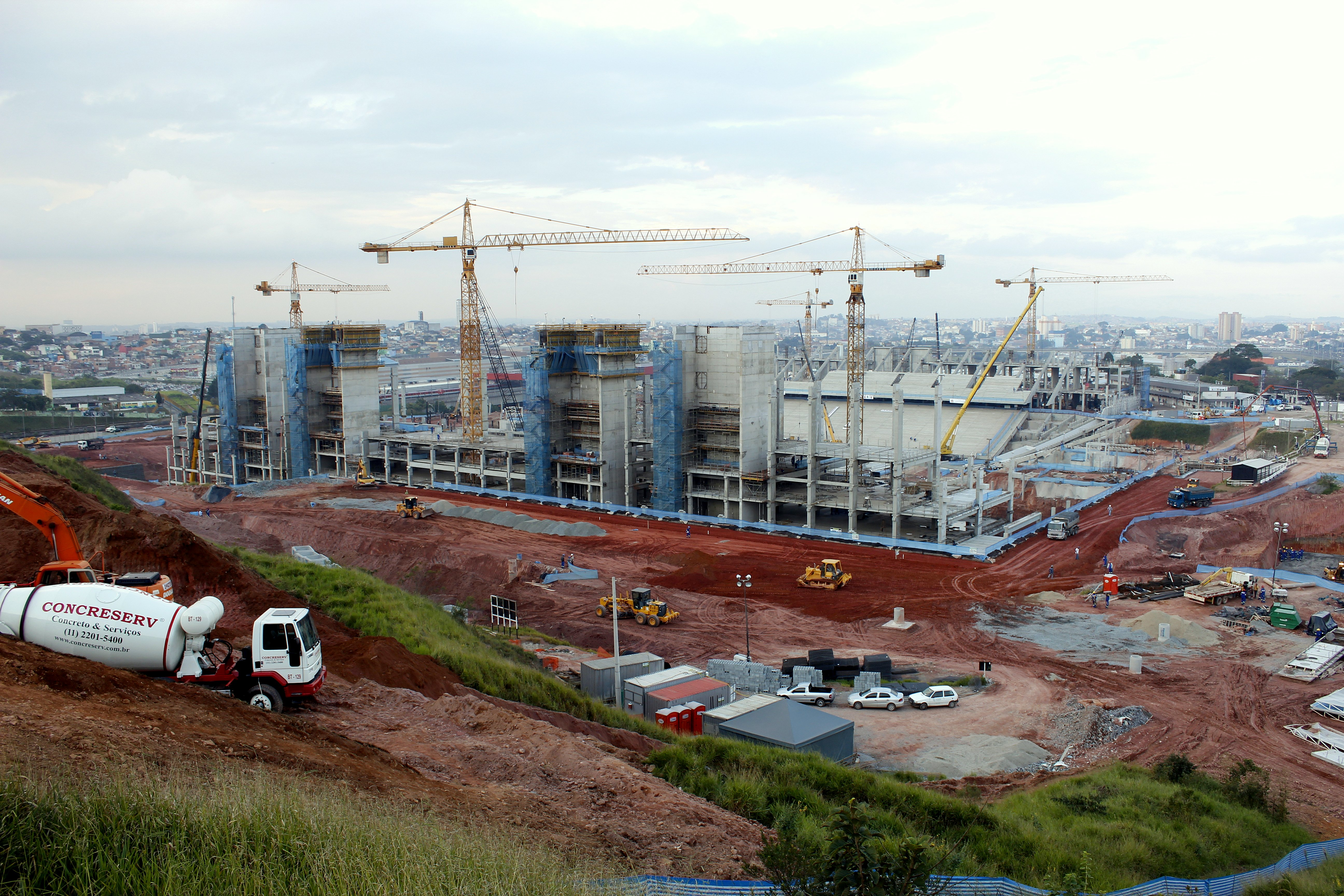 Construção do estádio do Corinthians